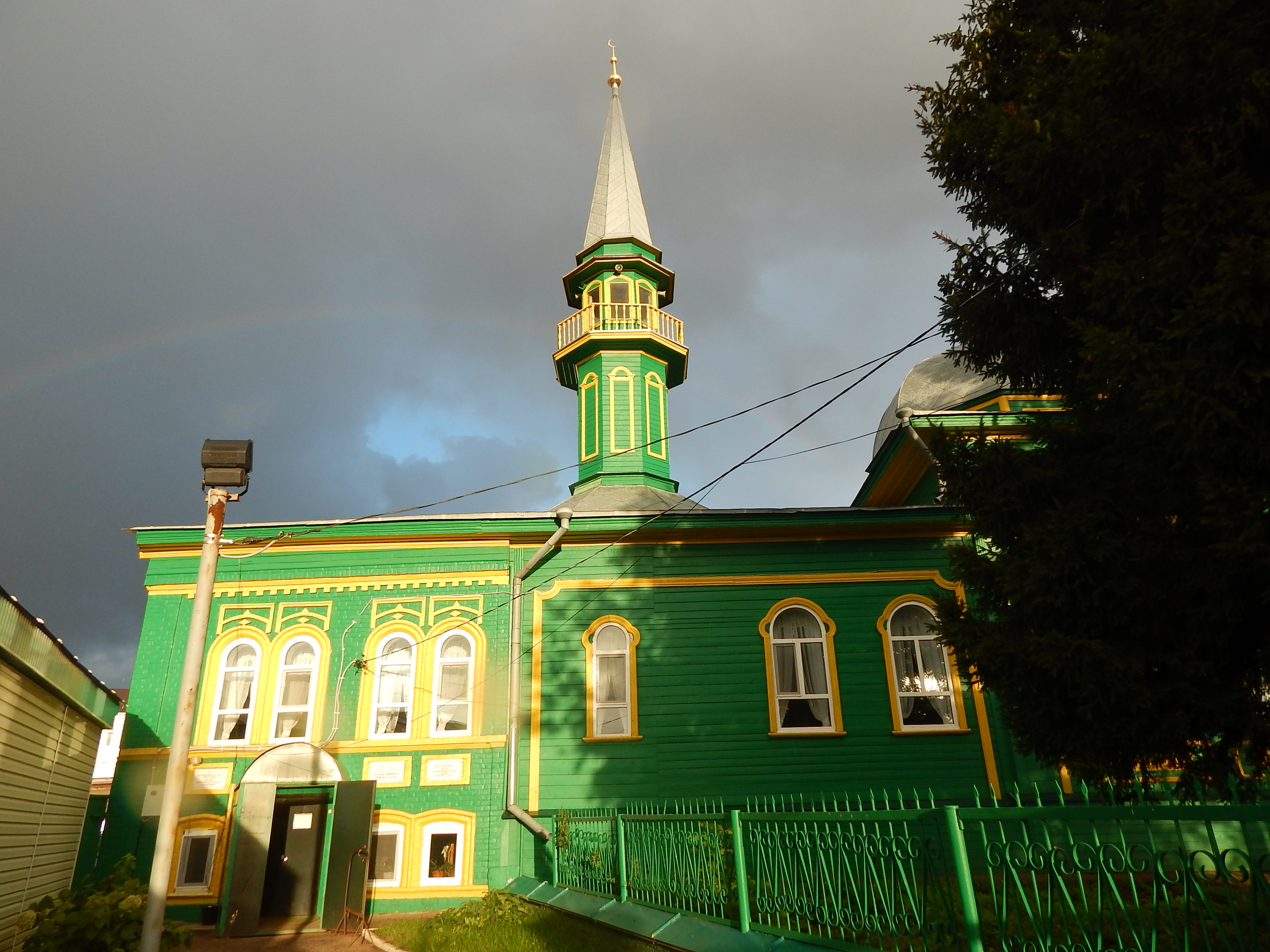 Мечеть: улица Вахитова, 39, Чистополь, Татарстан